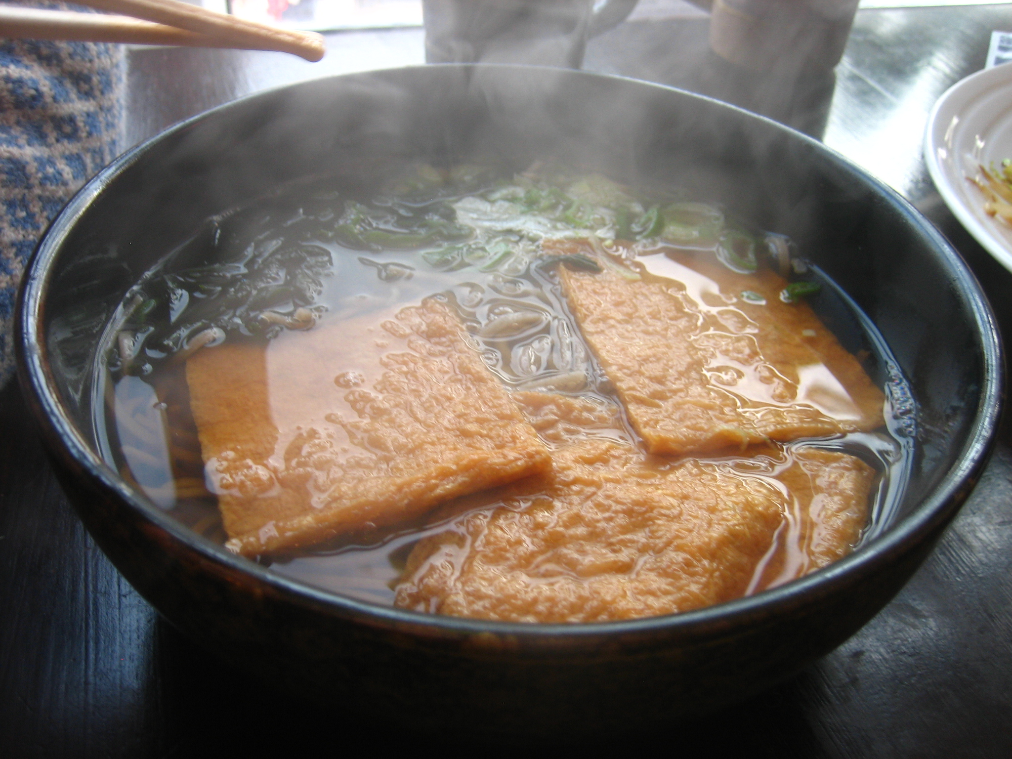 きつねそば（英国イースト・サセックス州ブライトンの「E-Kagen 寿司・麺・コーヒーバー）Noodles